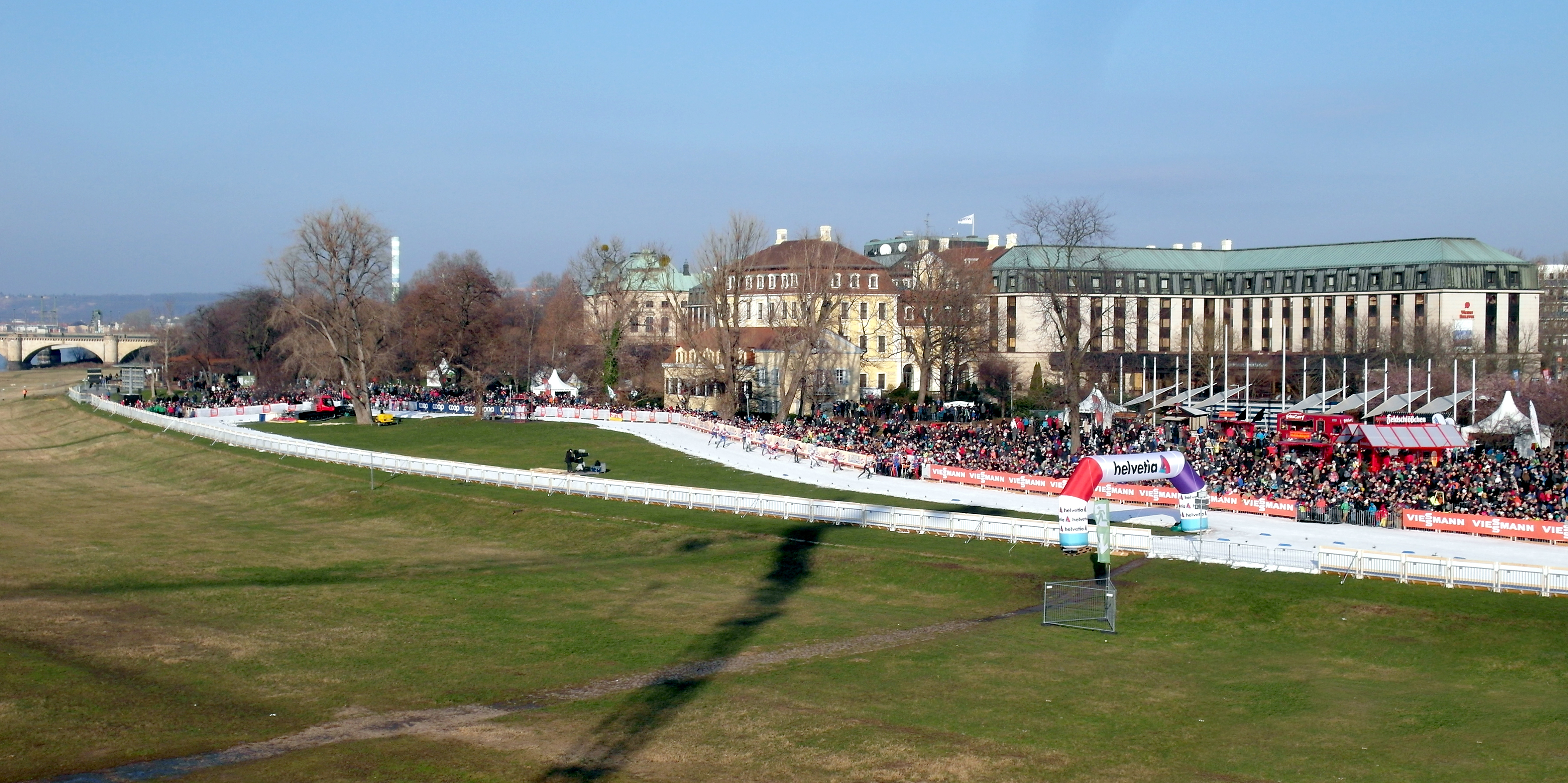 14.01.2018 01067 Dresden-Neustadt: Der Ski-Weltcup wird am Palaisufer (und Königsufer) der Elbe ausgetragen. Hier im Bild vor dem Hotel The Westin Bellevue mit Barockhaus (1718) und davor dem zum Hotel gehörenden Vogelschen Gartenhaus (1814), Große Meißner Straße15. Für die 1,4 km lange Strecke auf der grünen Wiese mußte man 4.000 m³ Schnee herankarren. Kosten 600.000 Euro. [SAM3586.JPG]20180114200DR.JPG(c)Blobelt